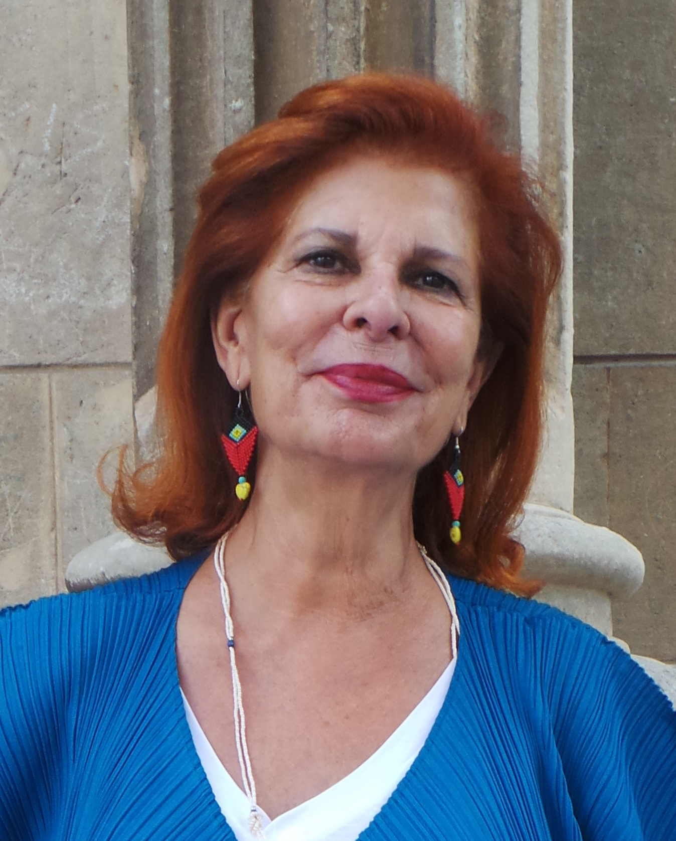 Palma de Mallorca. Septiembre 2015